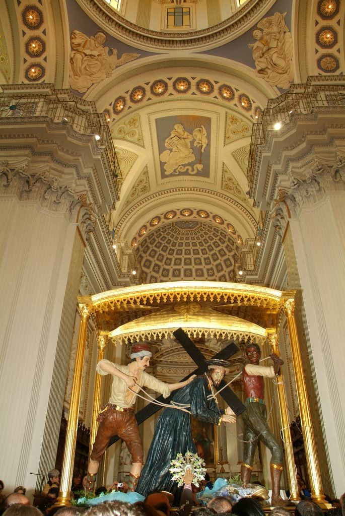 SS Cristo Con la Croce nella Chiesa SS Annunziata